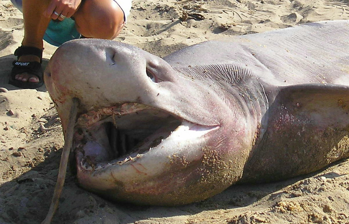 REQUIN HOSSEGOR LANDES